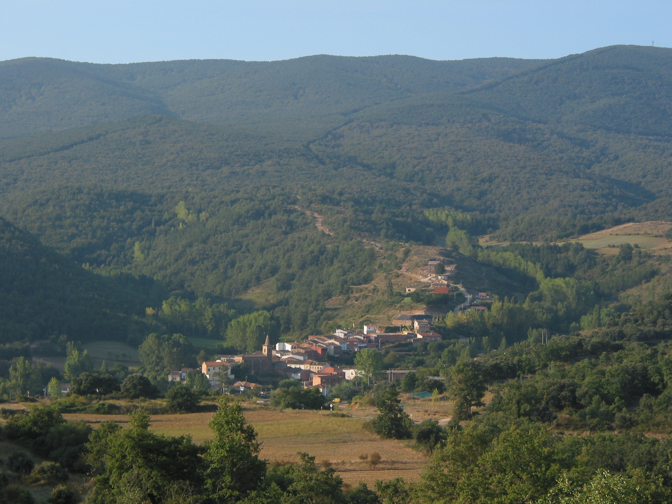 Localidad de Daroca de Rioja, situada en la cara norte de la Sierra de Moncalvillo